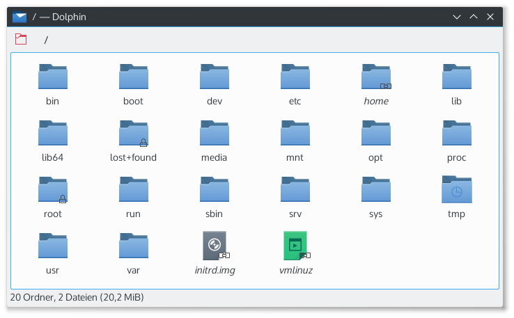 Ein Screenshot des Rootverzeichnisses unter Linux im KDE-Dateibrowser Dolphin.